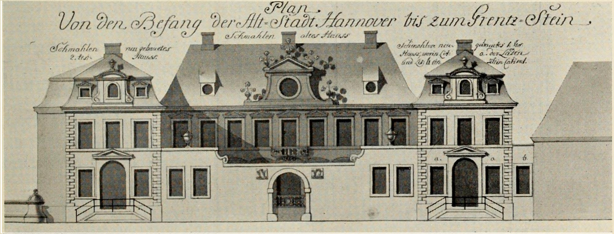 Aufriss des von Harlingschen Hauses in der Calenbergerstr. 29 Altstadt von Hannover aus Prozessakten des Hannoveraner Stadtarchivs, in: Die Kunstdenkmäler der Provinz Hannover. Heft 1: I. Regierungsbezirk Hannover. 1. Landkreise Hannover und Linden, Hannover 1899, S. 412.